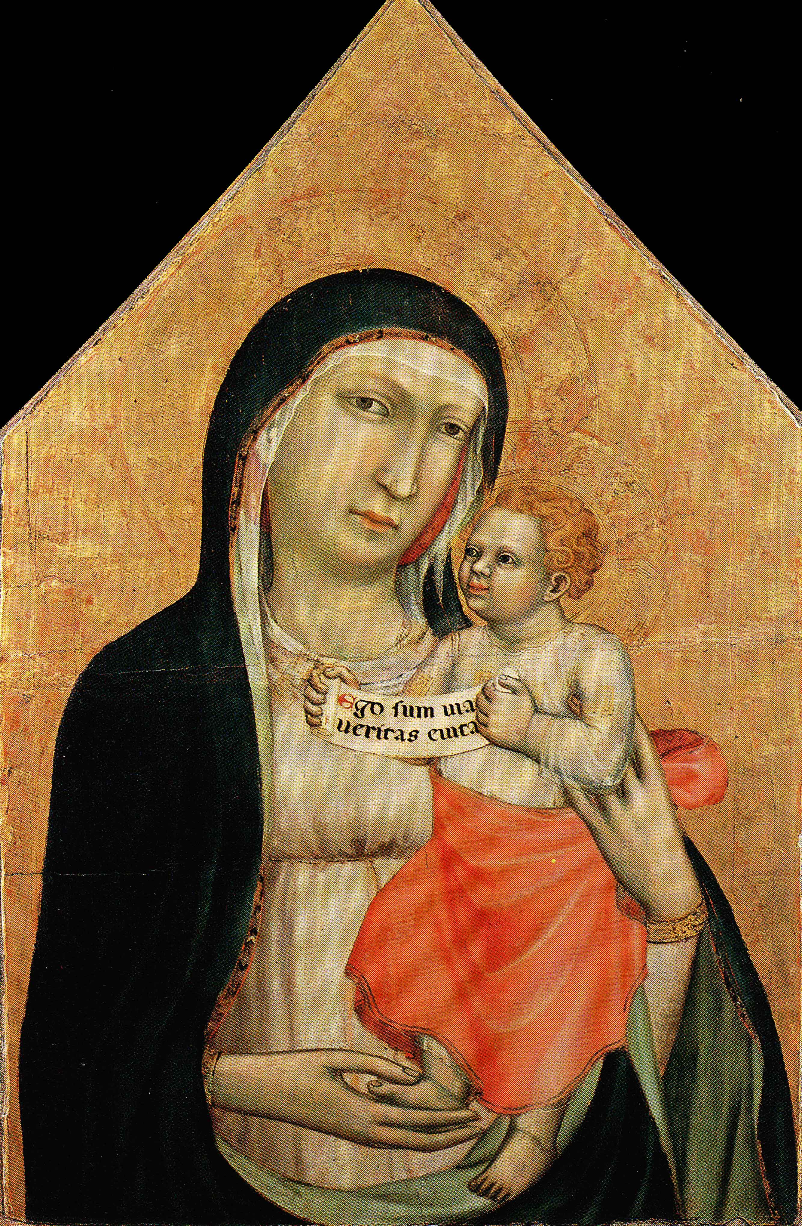 Lippo di Benivieni - Madonna col bambino (1310-1320)